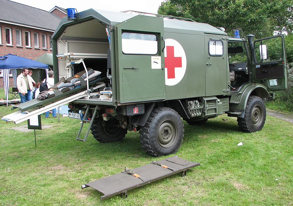 Unimog des Sanitätsstützpunkts Hohe Düne, Rostock-Warnemünde